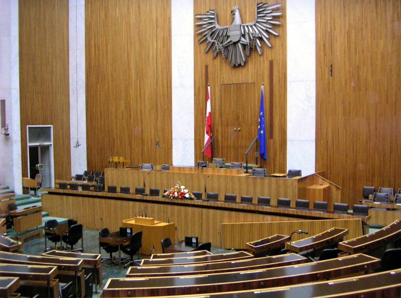 Nationalrat im österreichischen Parlament